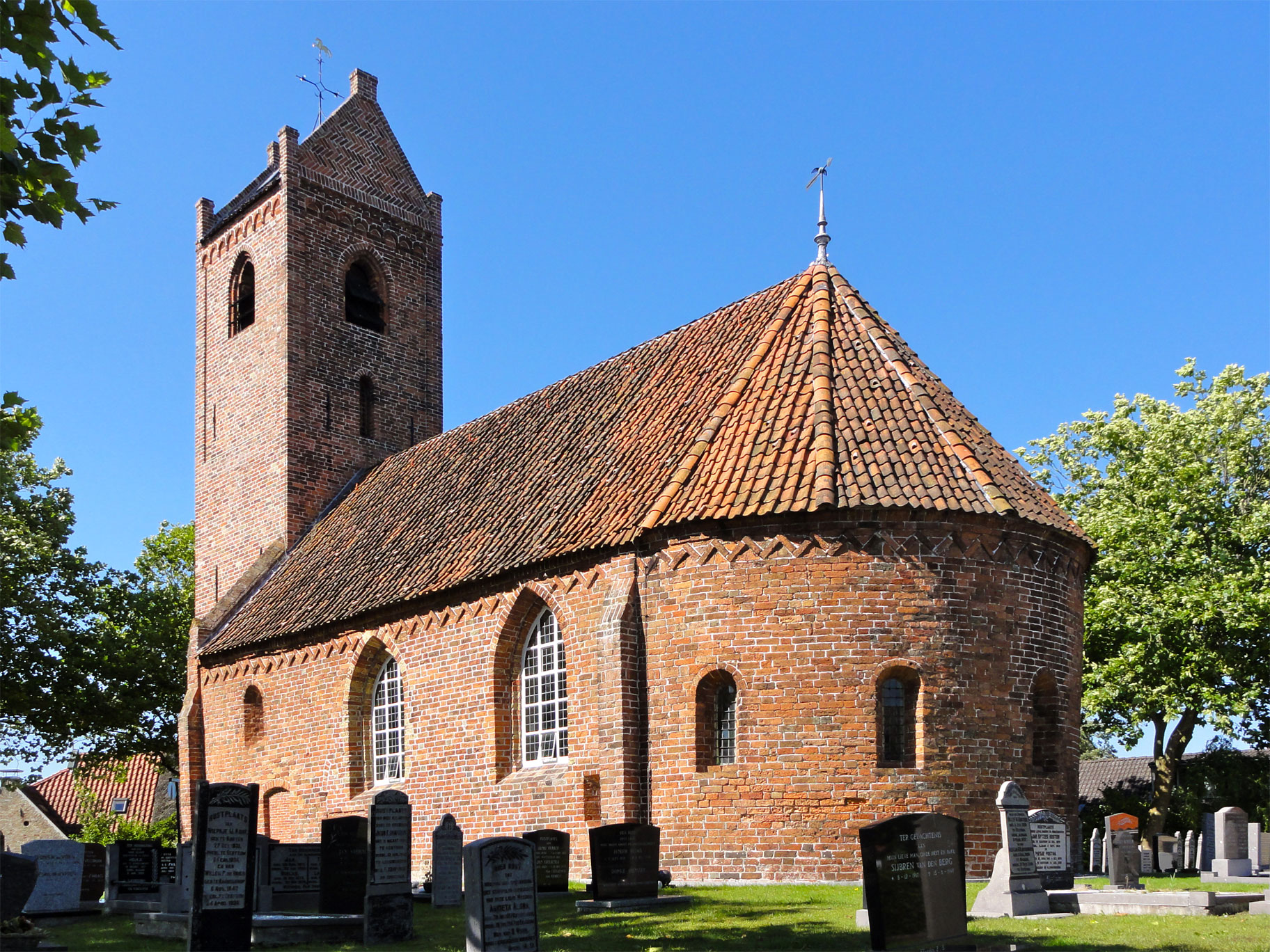 Sint-Petruskerk Schoolstraat 2 Jistrum